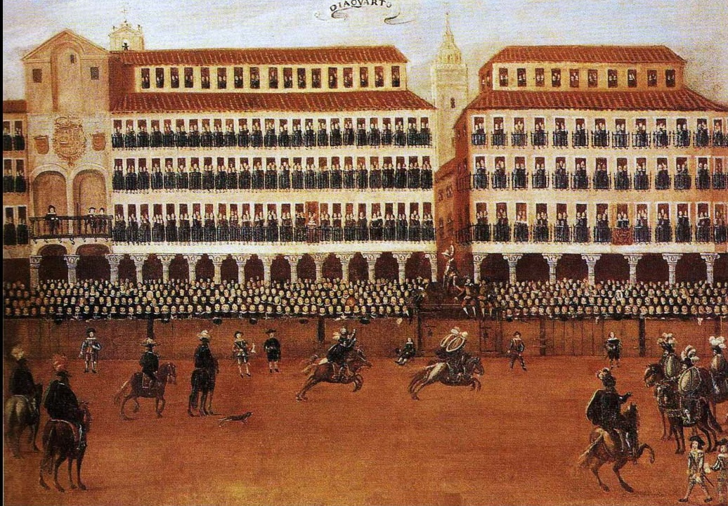 Lienzo de 1656 que representa una corrida de toros en la Plaza Mayor de Valladolid. A la izquierda de la imagen aparece la fachada principal del desaparecido convento de San Francisco de Valladolid, que fue desamortizado y demolido en 1836.